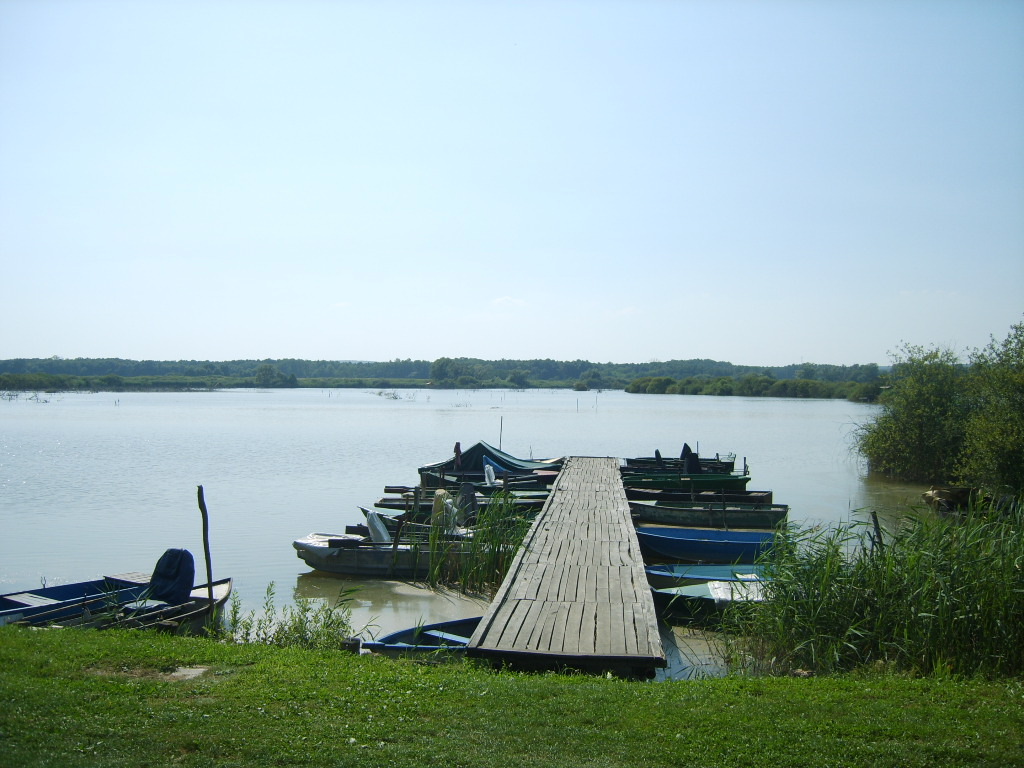 A zalaszentmihályi horgásztavon levő egyik horgásszstég.